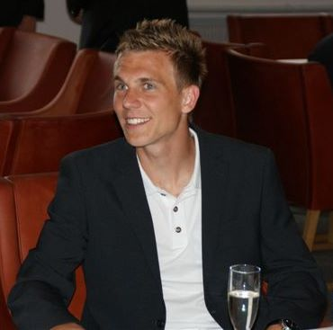 Fodboldspilleren Bořek Dočkal under velkomstmiddagen på Golf Hotel Viborg, i forbindelse med U-21 Europamesterskabet i fodbold 2011.